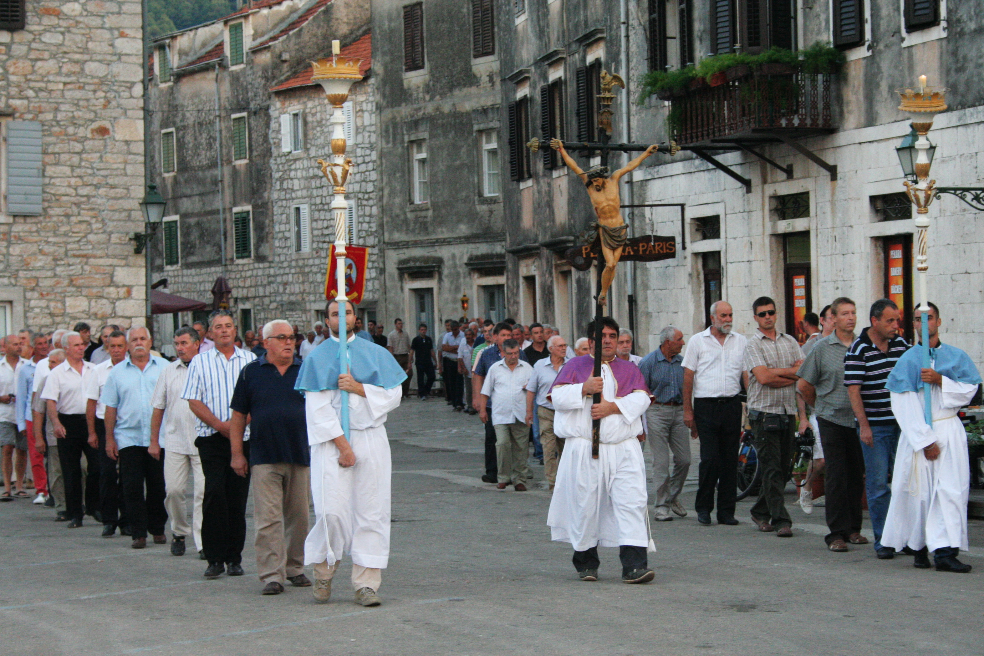 Procesija na blagdan sv. Roka u Starom Gradu